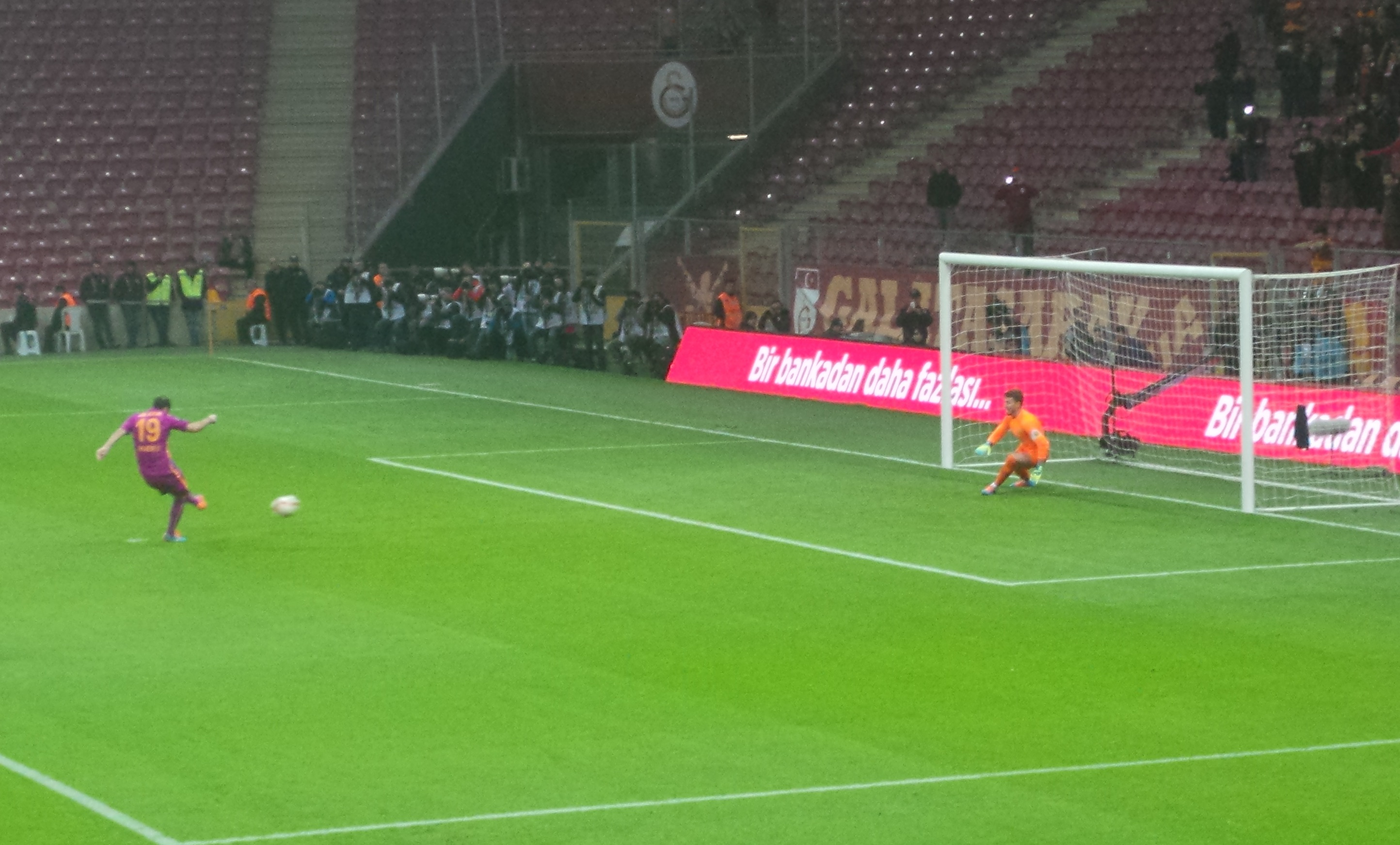 Goran Pandev'in Eskişehirspor ile oynanan Türkiye Kupası müsabakasında kaçırdığı penaltı.